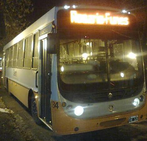 Volkswagen VolksBus de la línea 133 Negra, en la punta de línea de Funes (estación de servicio Petrobras), Ruta 9 y Angelomé